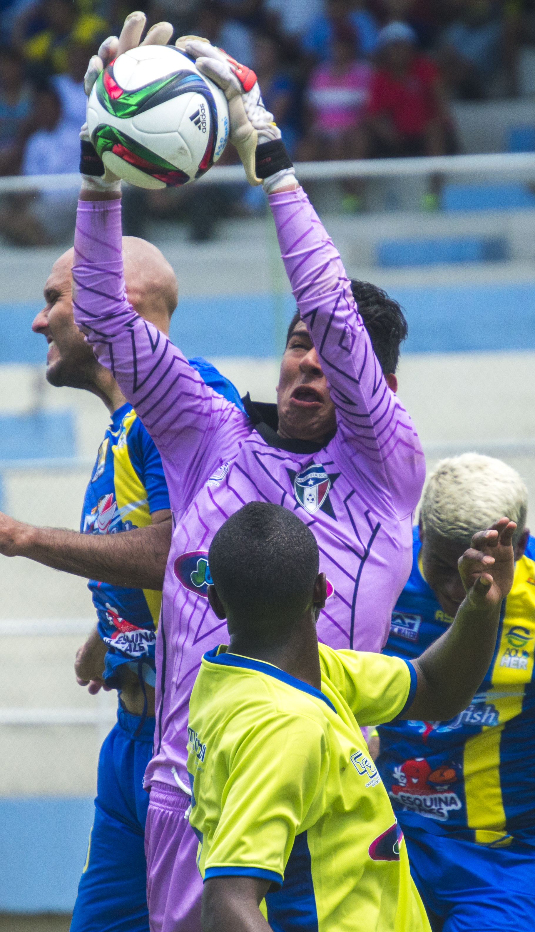 Edisson Recalde atajando en el Imbabura SC en el 2015